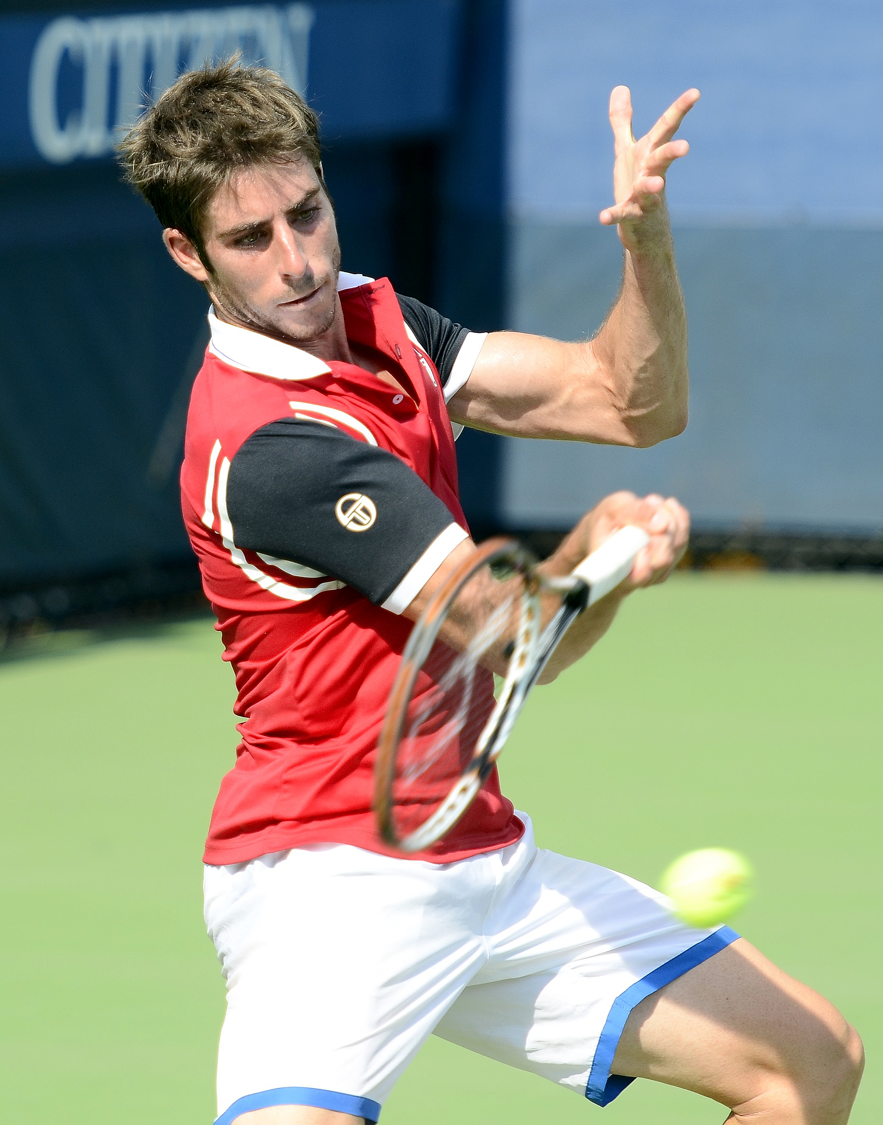 August 19, 2014 Queens, NY Michael Russell (USA) def. Enrique Lopez-Perez (ESP)